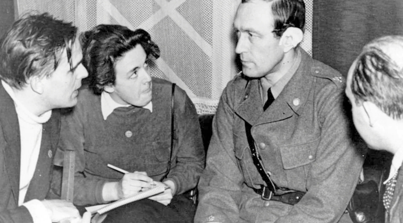 Alma Braathen (andra från vänster) under intervju 1940 med chefen för svenska frivilliga flygflottiljen i norra Finland.